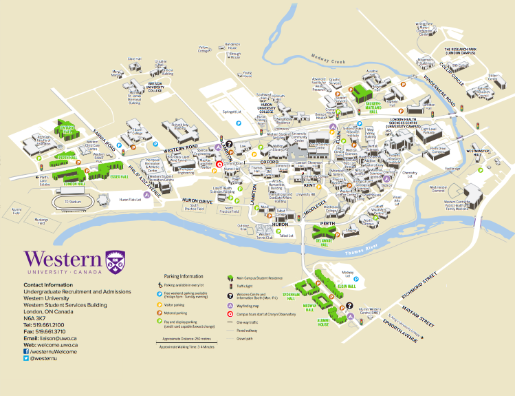 UWO Campus Map